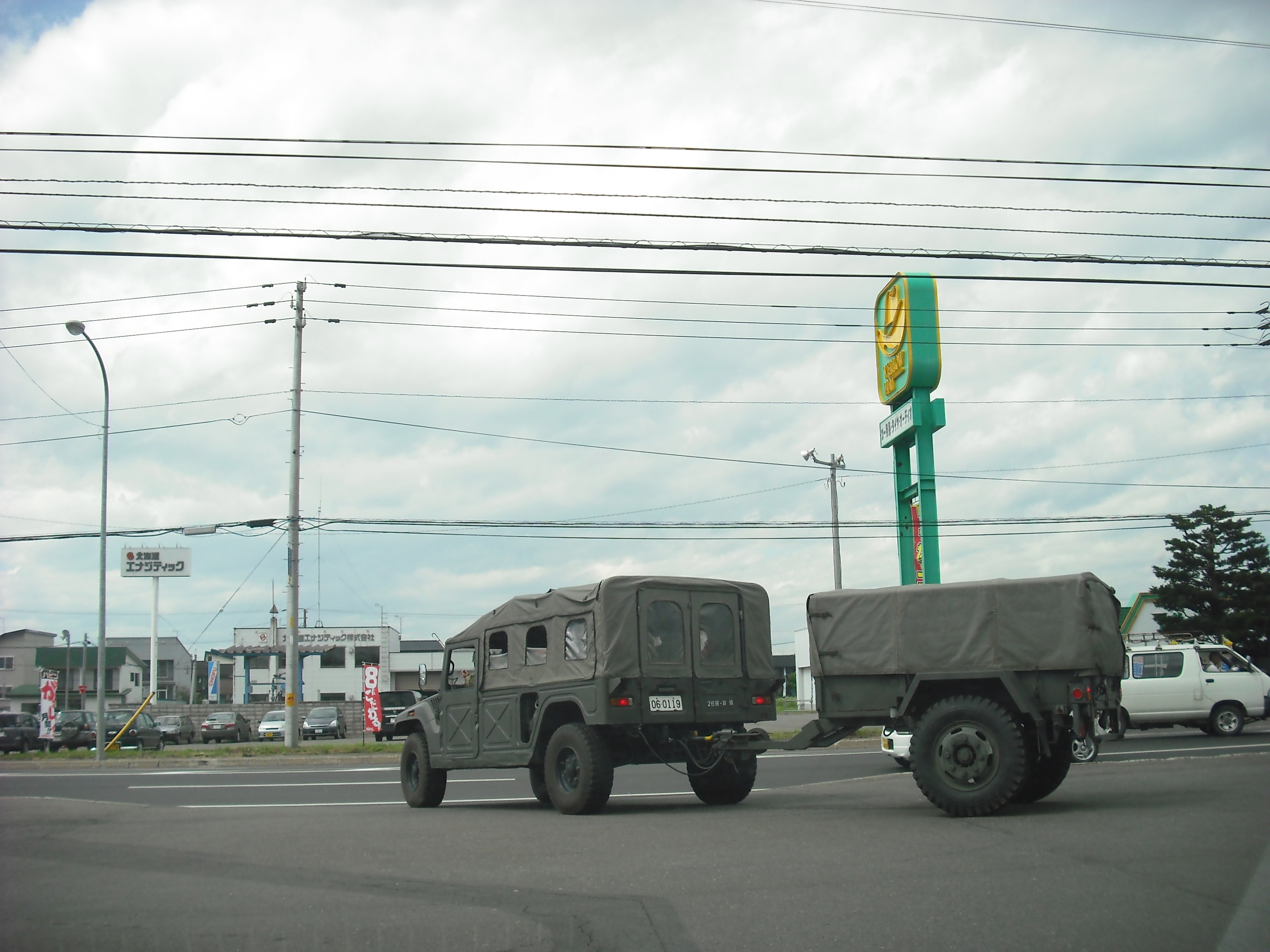 北海道深川市のセブンイレブンにて休憩中に見かけた車両を撮影、高機動車及びトレーラーは旧型同士